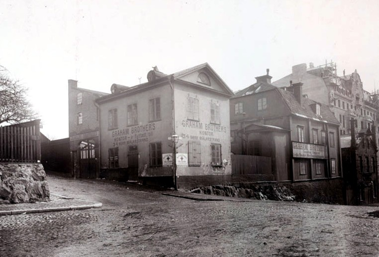 Graham Brothers anläggning vid Kungsholmstorg i Stockholm